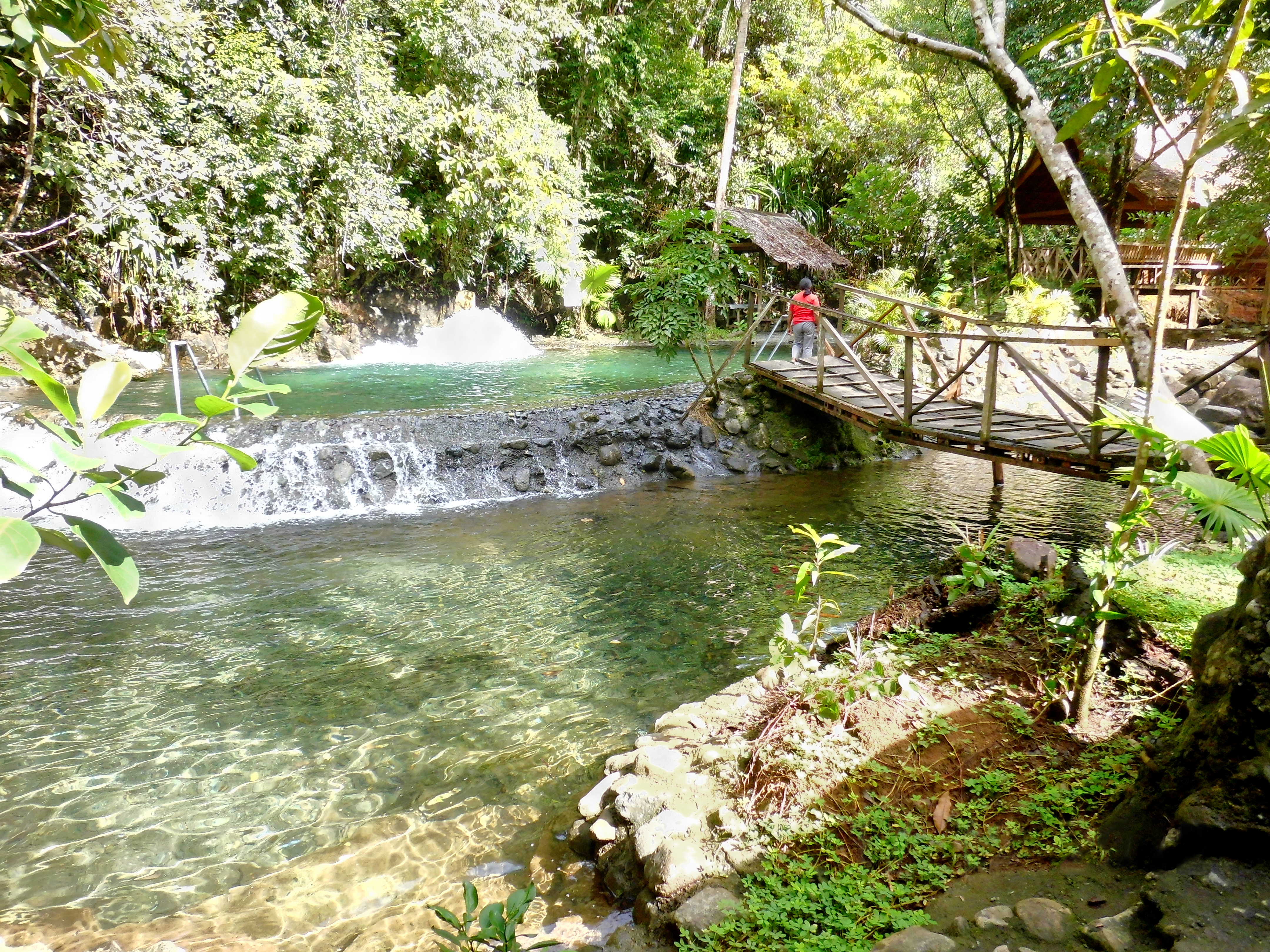 Urwaldbad "Sua cool spring" Schwimmbecken, Philippines, Surigao del Sur, Madrid (Esperanza)